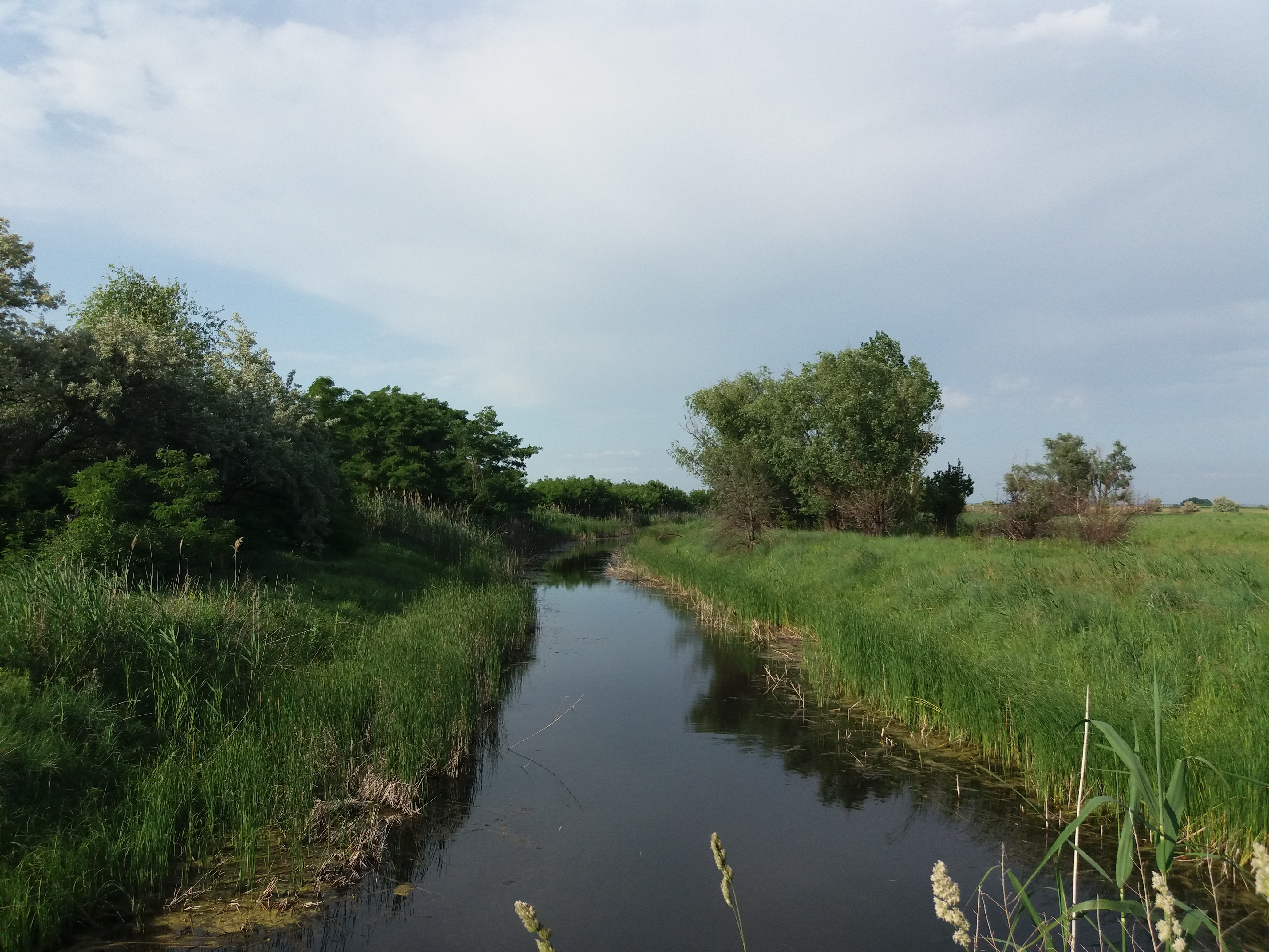 Річка Рудька в Козельщинському районі